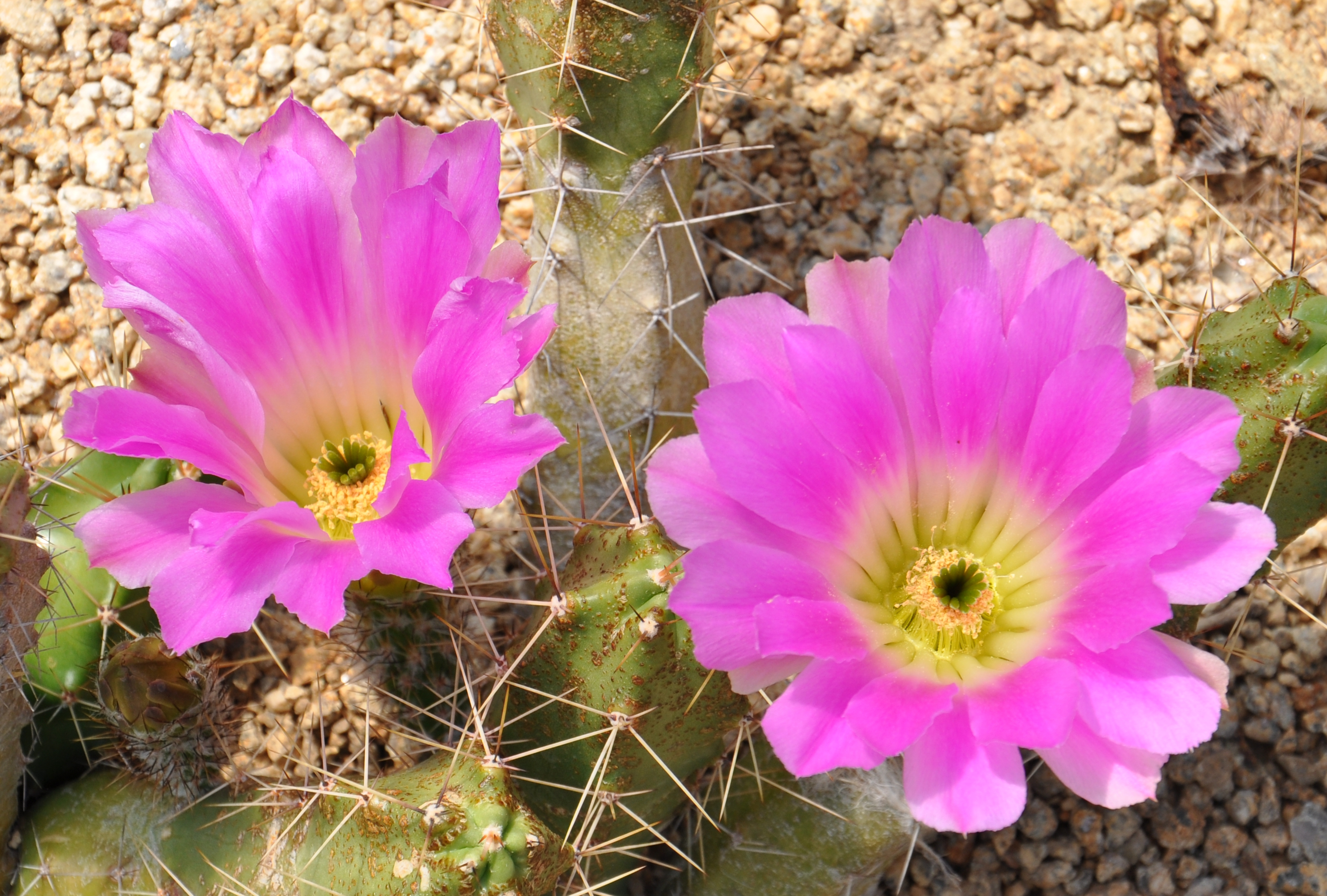 Fleurs d'Echinocereus pentalophus dans une serre au Jardin exotique de Roscoff le 12/05/2012.